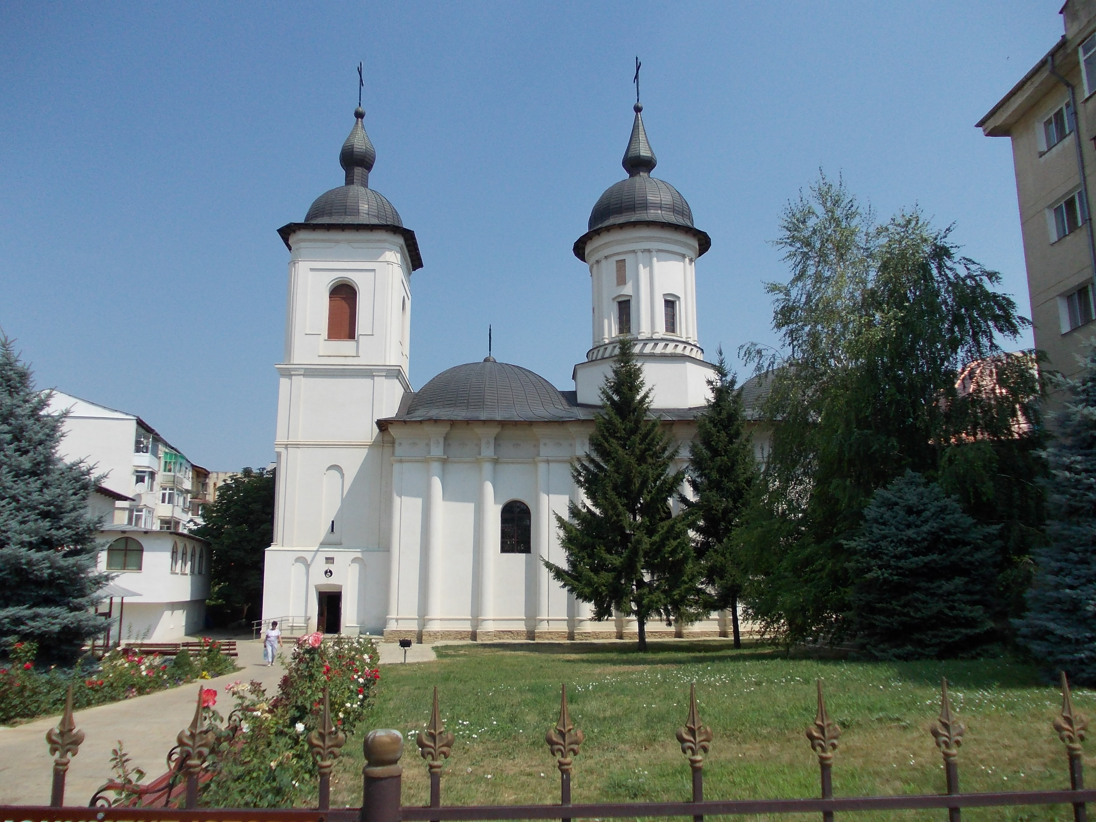 Biserică în Botoşani